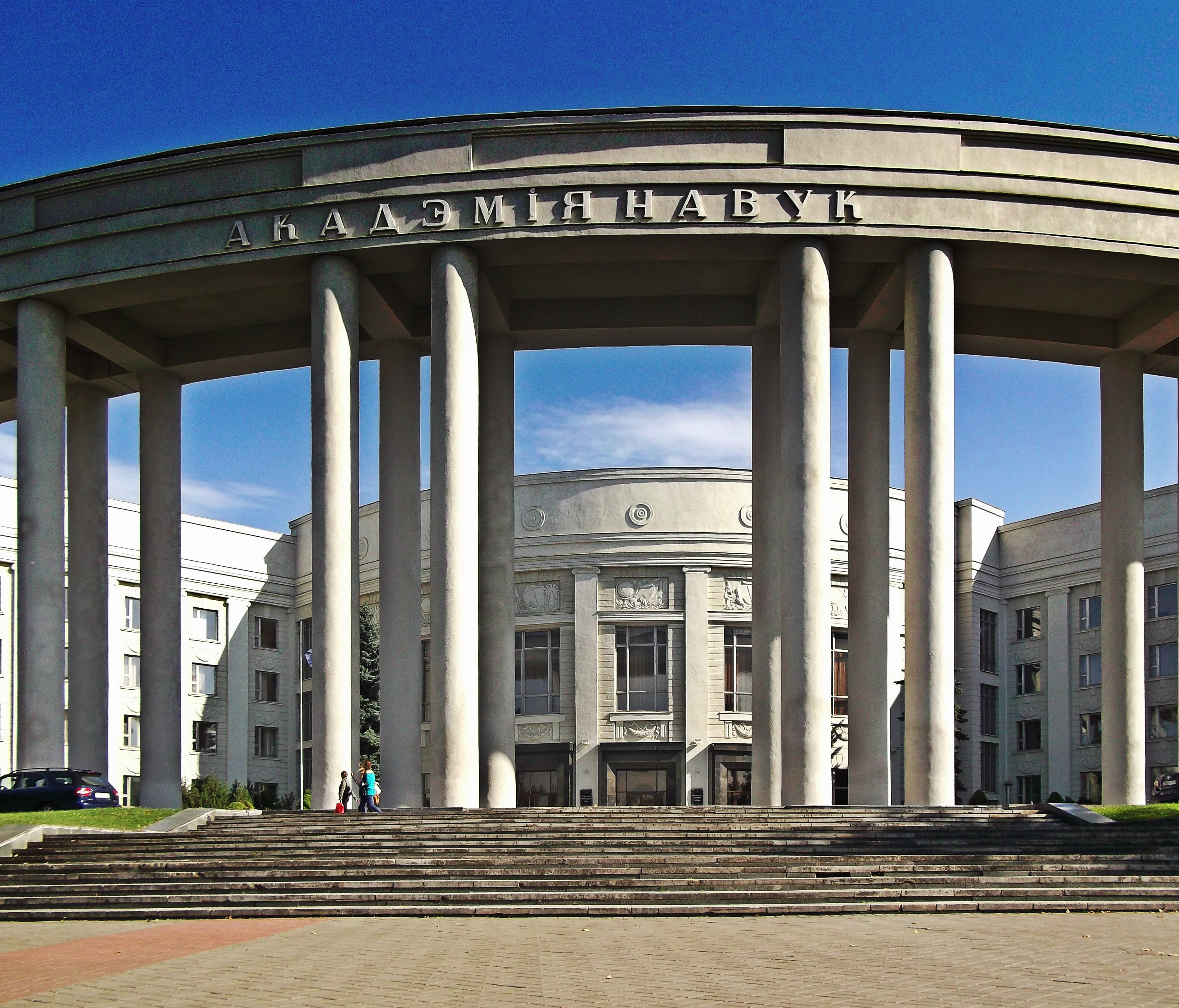 Беларуская (тарашкевіца): Будынак галоўнага корпуса Нацыянальнай акадэміі навук Беларусі. г. Менск This is a photo of Belarusian heritage monument. Reference number: 712Г000198 ( WLM)